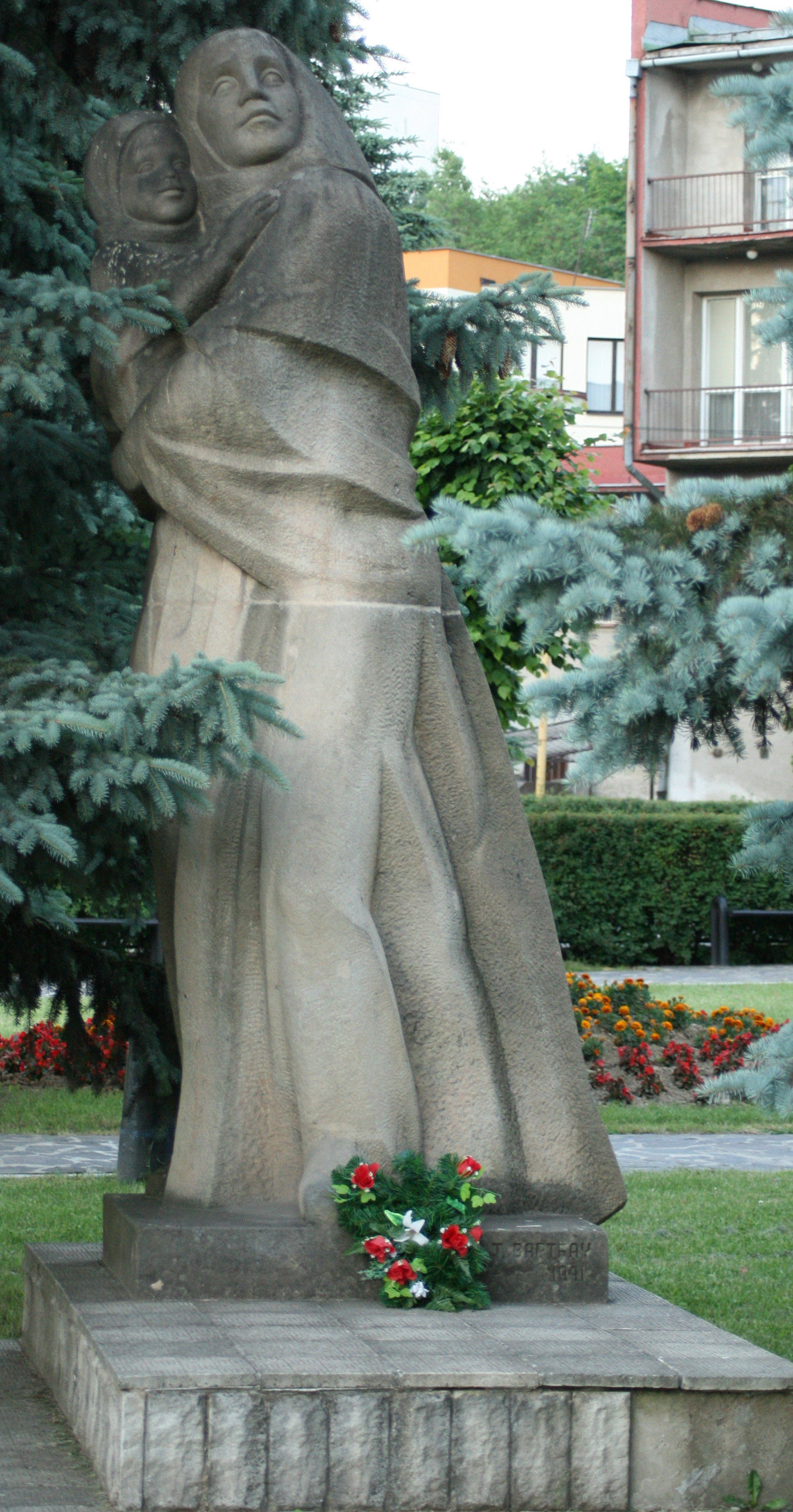 "POMNÍK OSLOBODENIA" odhalený v Giraltovciach, pri príležitostí SNP v roku 1991.